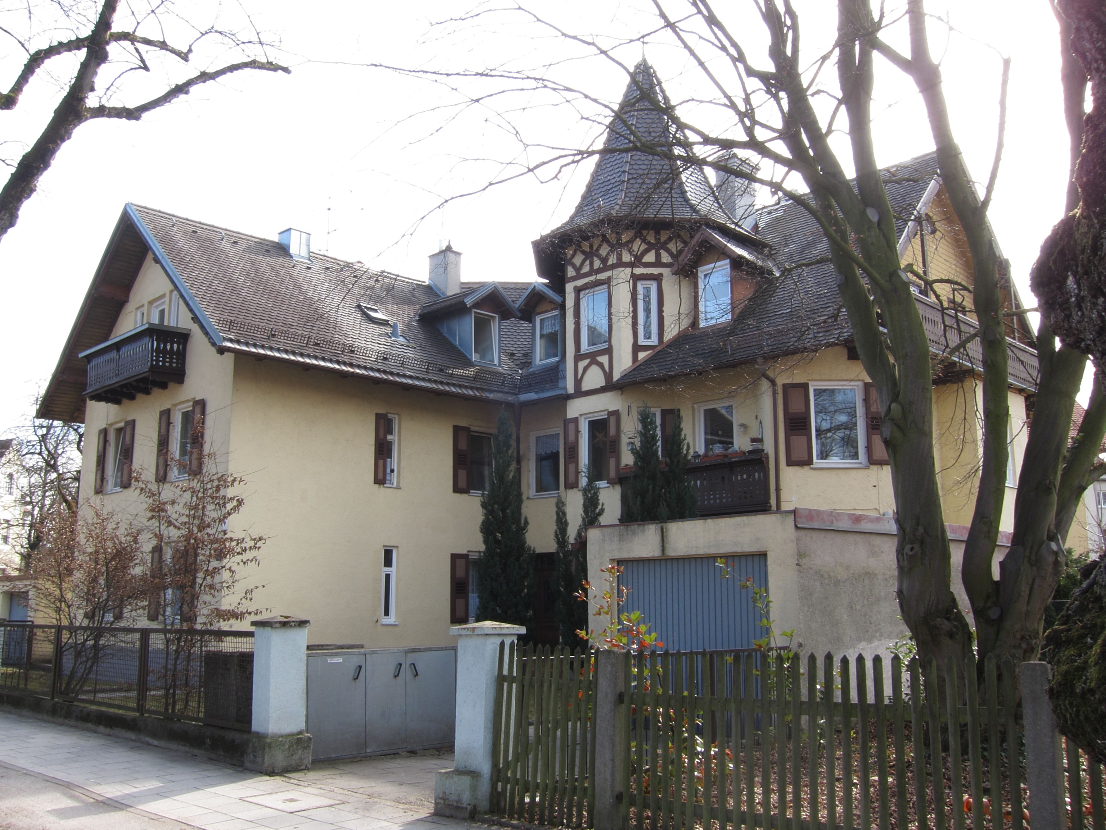 Alte Allee 7; Größere malerische Villa mit Turm, Balkon, Fachwerk, 1897–98 und 1902–03 von Georg Heckmann.